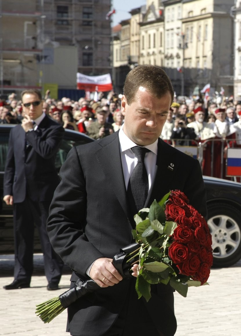 Дмитрий Медведев возложил цветы к портретам Леха и Марии Качиньских.